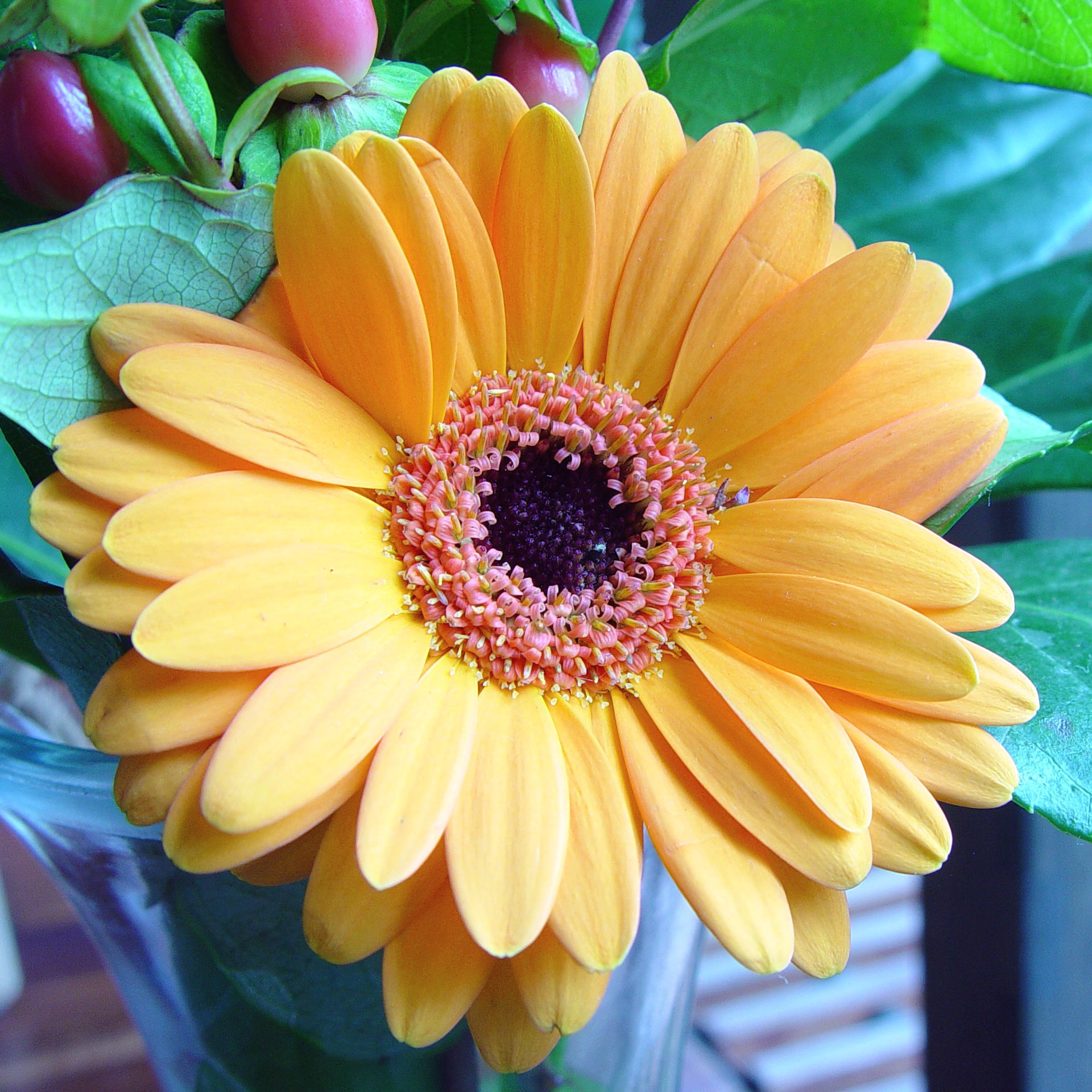 Gerberadie blaue blume der romantik